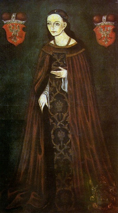 Anna Radziwiłłówna, księżna mazowiecka